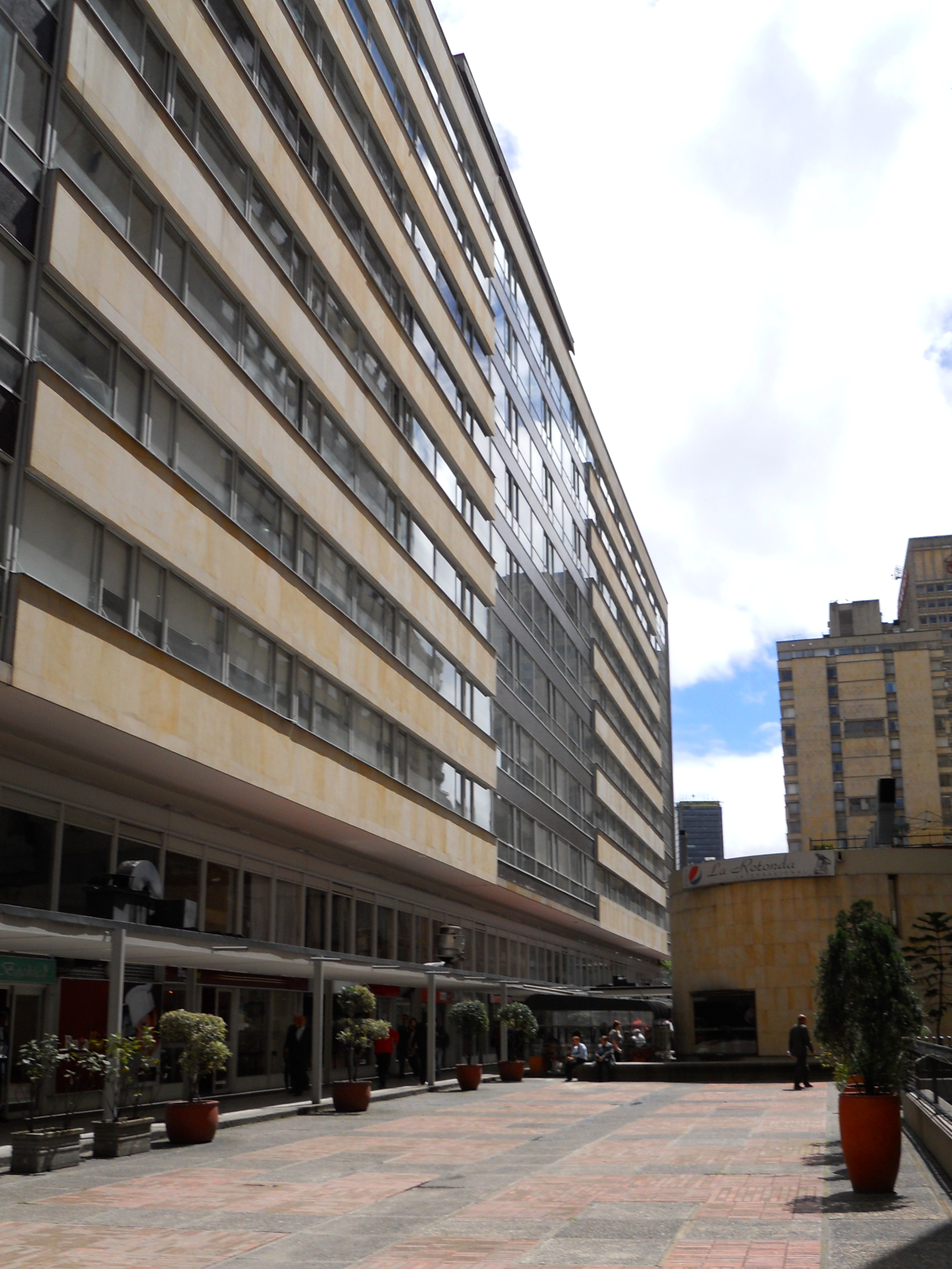 Edificio en la zona occidental del Centro Internacional.